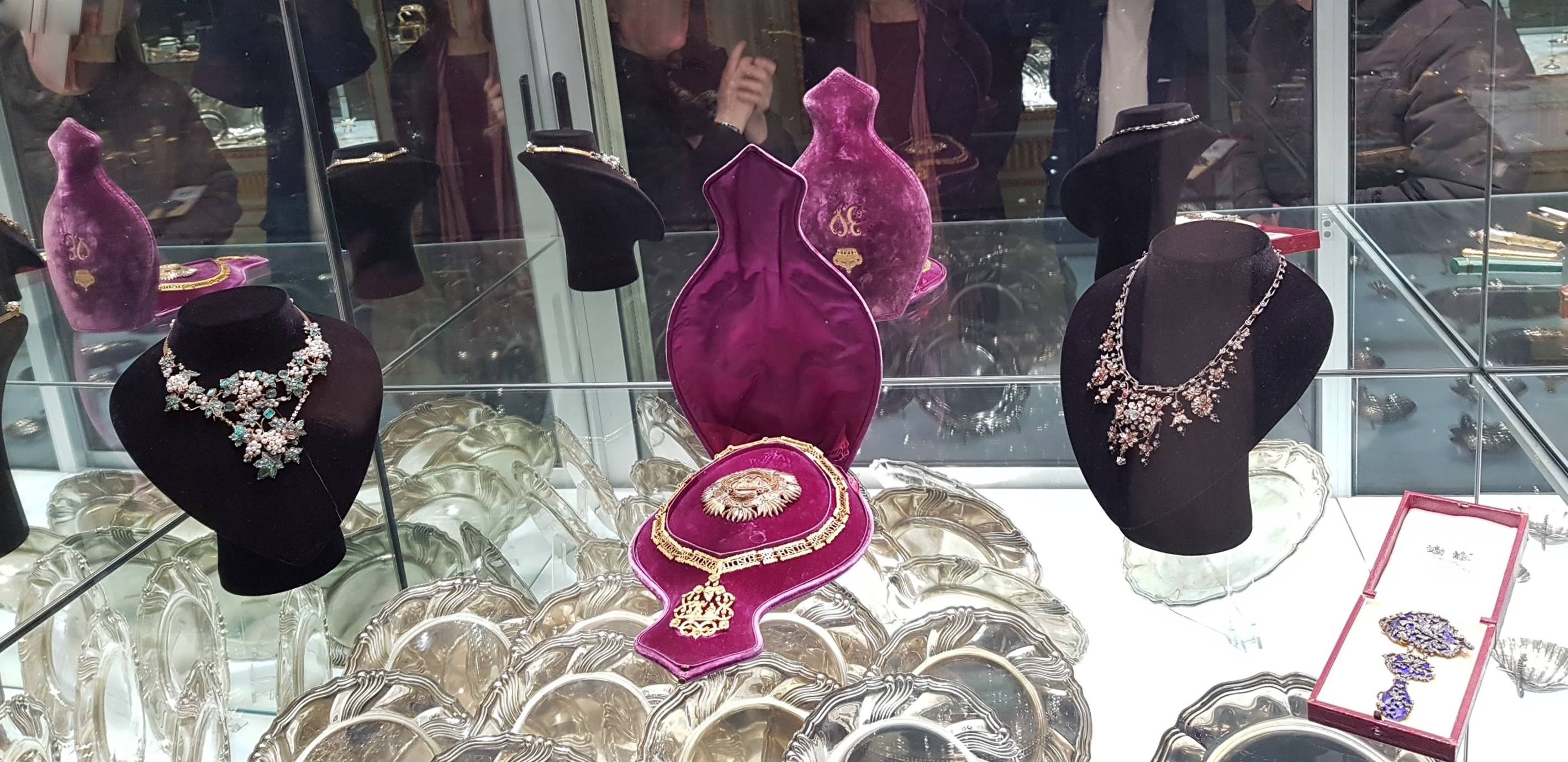 Piccolo collare della Santissima Annunciata, Sala dei Preziosi, Museo di Arti Decorative Accorsi–Ometto, Torino